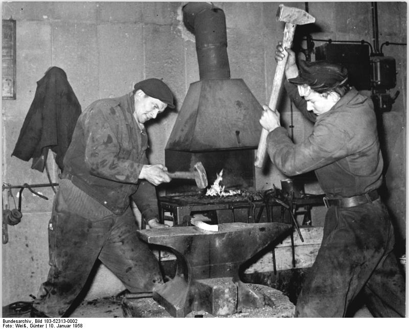 Sachsendorf, Schmiede der MTS Zentralbild Weiß Weis-Qu 10.1.1958 Oderbruch-MTS-Sachsendorf arbeitet nach neuer Betriebsordnung Die MTS Sachsendorf im Oderbruch, Kreis Seelow arbeitet seit einigen Tagen bereits erfolgreich nach einer neuen Betriebsordnung. Diese wurde entsprechend einer Forderung der Thesen des Politbüros des ZK der SED zur II. Zentralen MTS-Konferenz vom Ministerium für Land- und Forstwirtschaft gemeinsam mit den Werktätigen der MTS Sachsendorf erarbeitet und soll allen MTS als Vorbild für die Neuregelung der innerbetrieblichen Arbeit dienen. UBz: Die Brigade 5 in Alt-Tucheband hat sich vorgenommen, die Reparaturarbeiten an den Maschinen und Geräten für die Frühjahrsbestellung bis zum 24. Januar - dem Beginn der II. Zentralen MTS-Konferenz - zu beenden. Links: Brigadier Schlosser Walter Urban, rechts: Hilfsarbeiter Karl Aschenbrenner